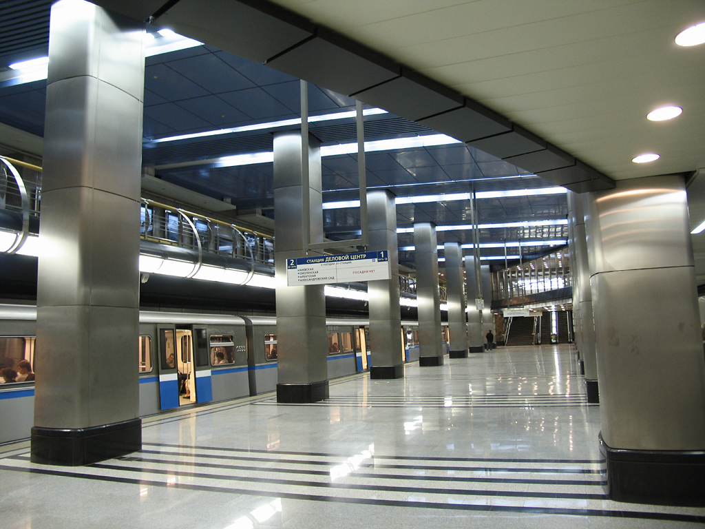 Delovoi Tsentr